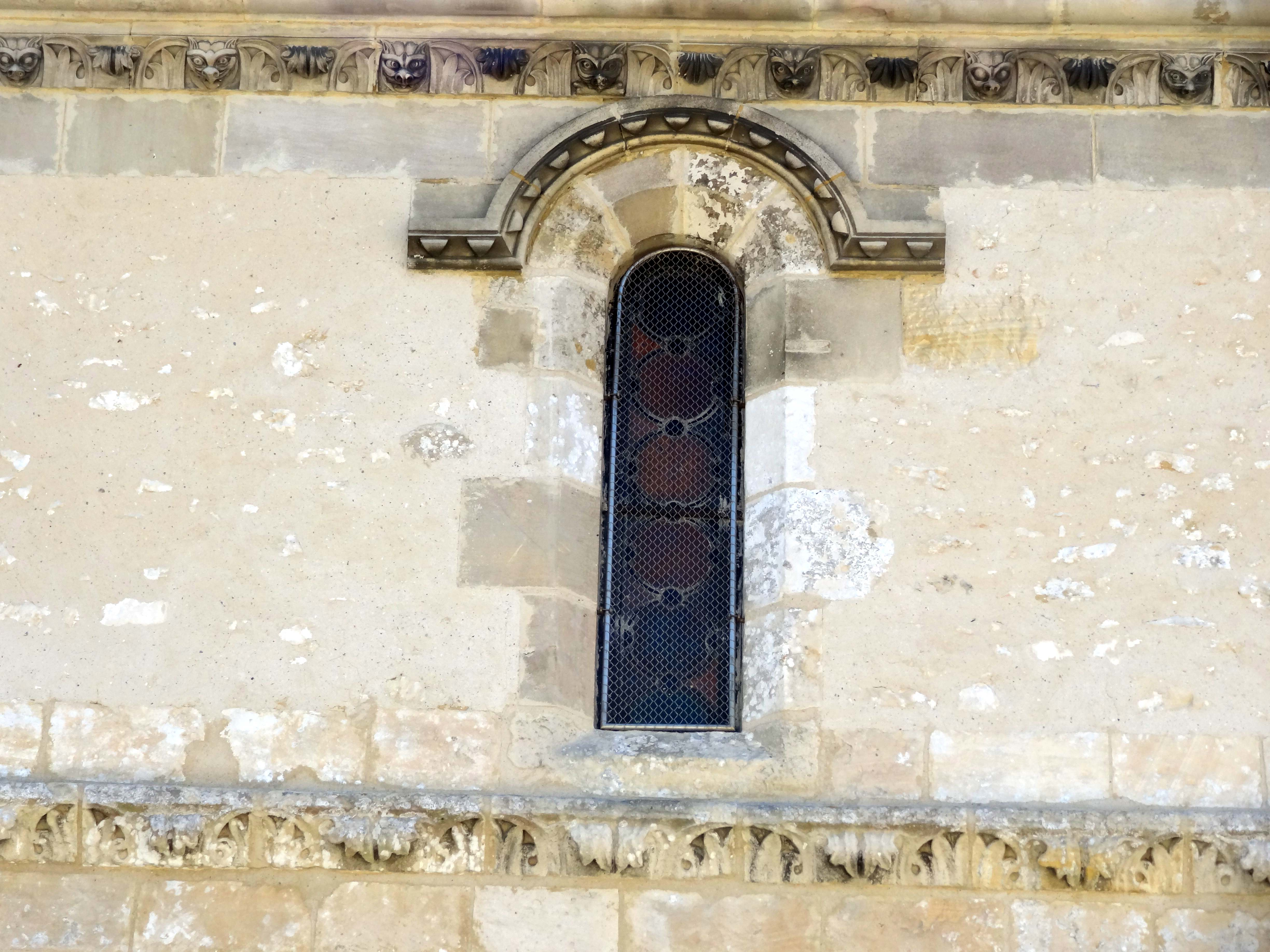 Église Sainte-Madeleine de Trie-Château - voir titre.